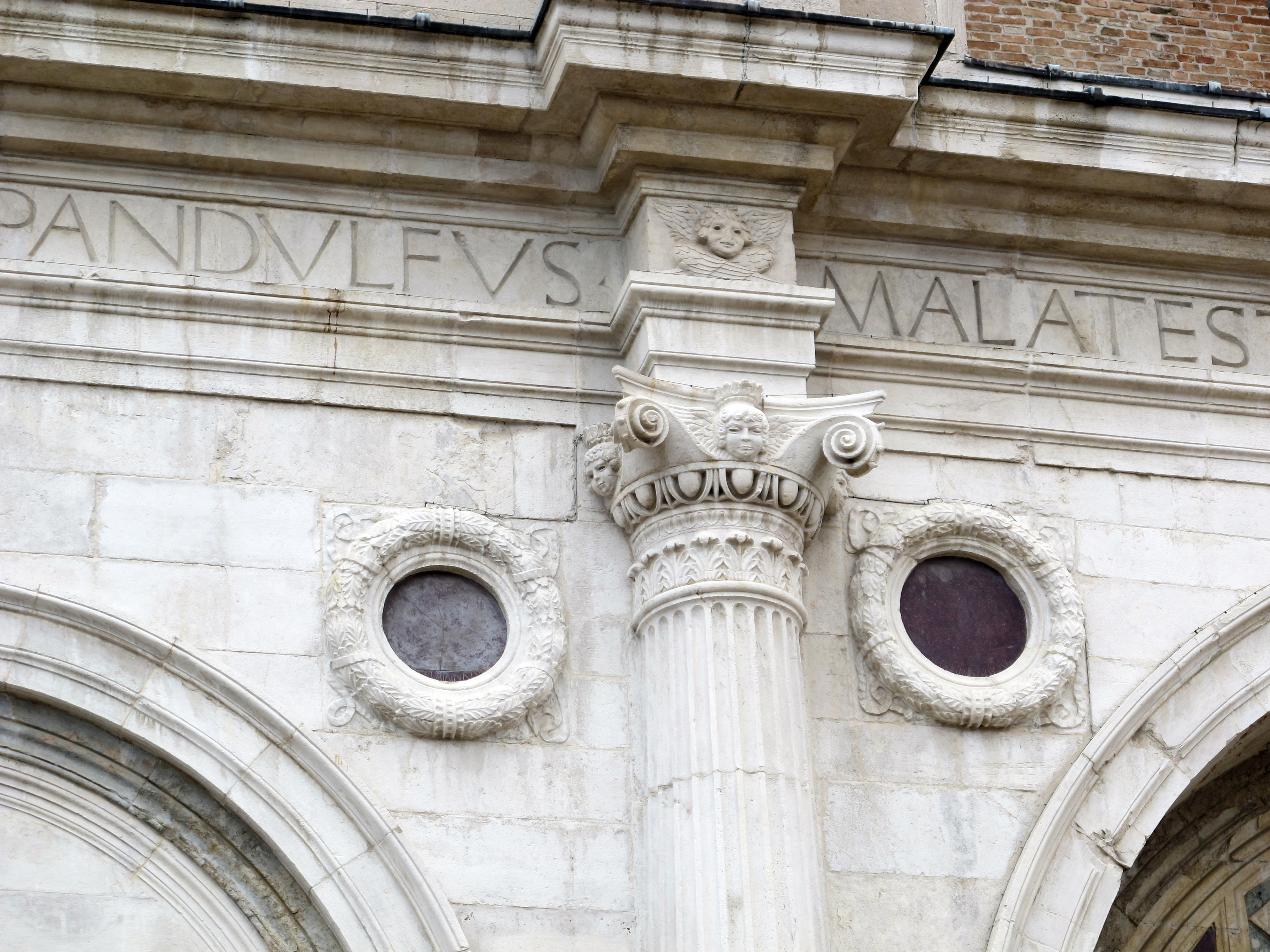 Tempio Malatestiano - MIBAC This is a photo of a monument which is part of cultural heritage of Italy.